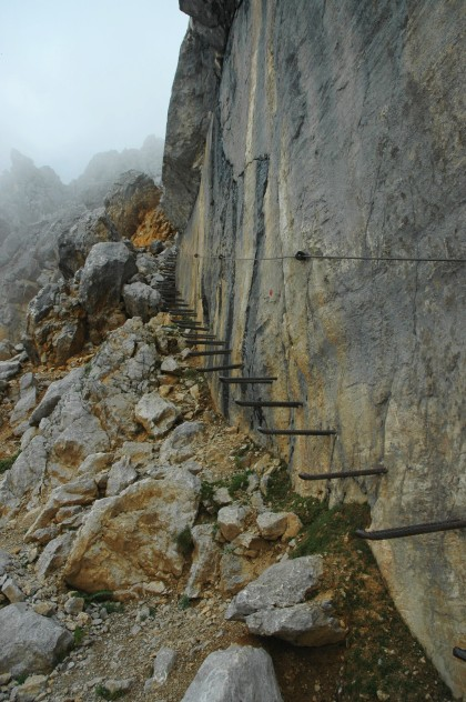 Jagerwandtreppe, Ellmauer Halt